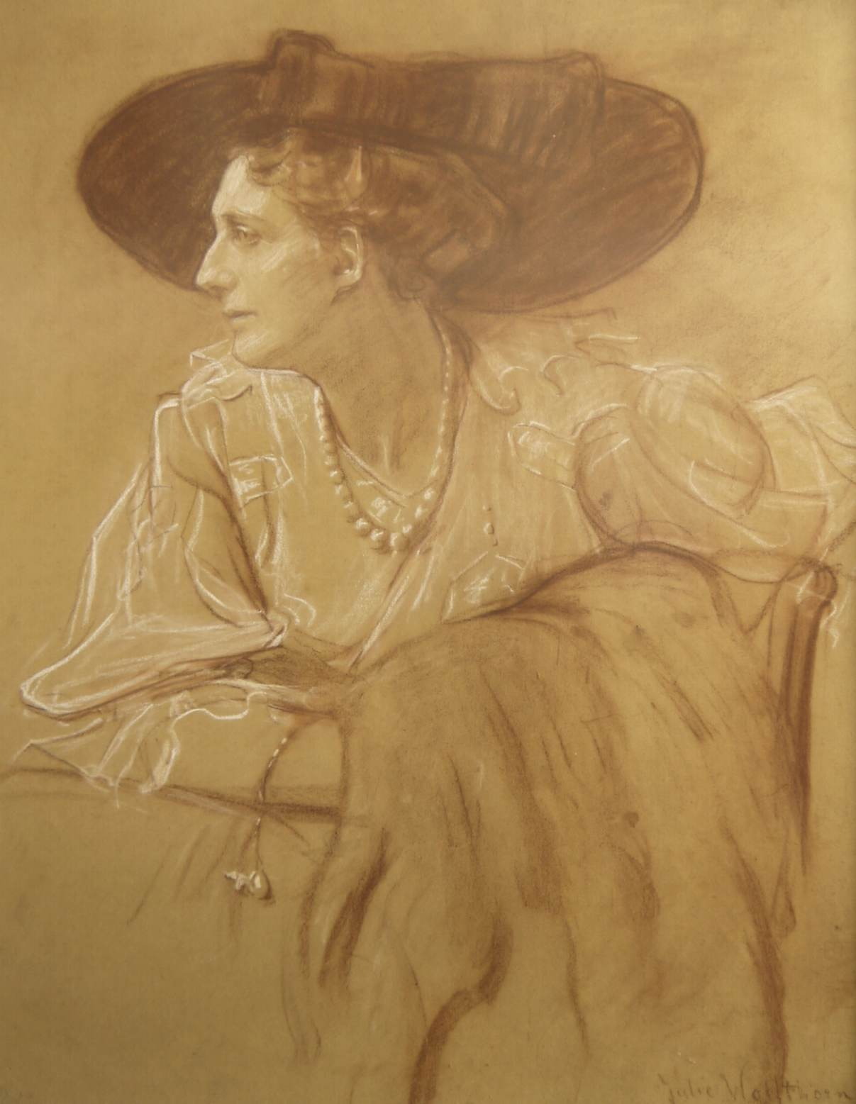 Julie Wolfthorn - Portrait Frau Professor Peter Behrens (Lilli Behrens)